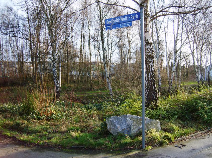 Berthold-Wolff-Park in Stolberg bei Aachen, benannt nach Berthold Wolff